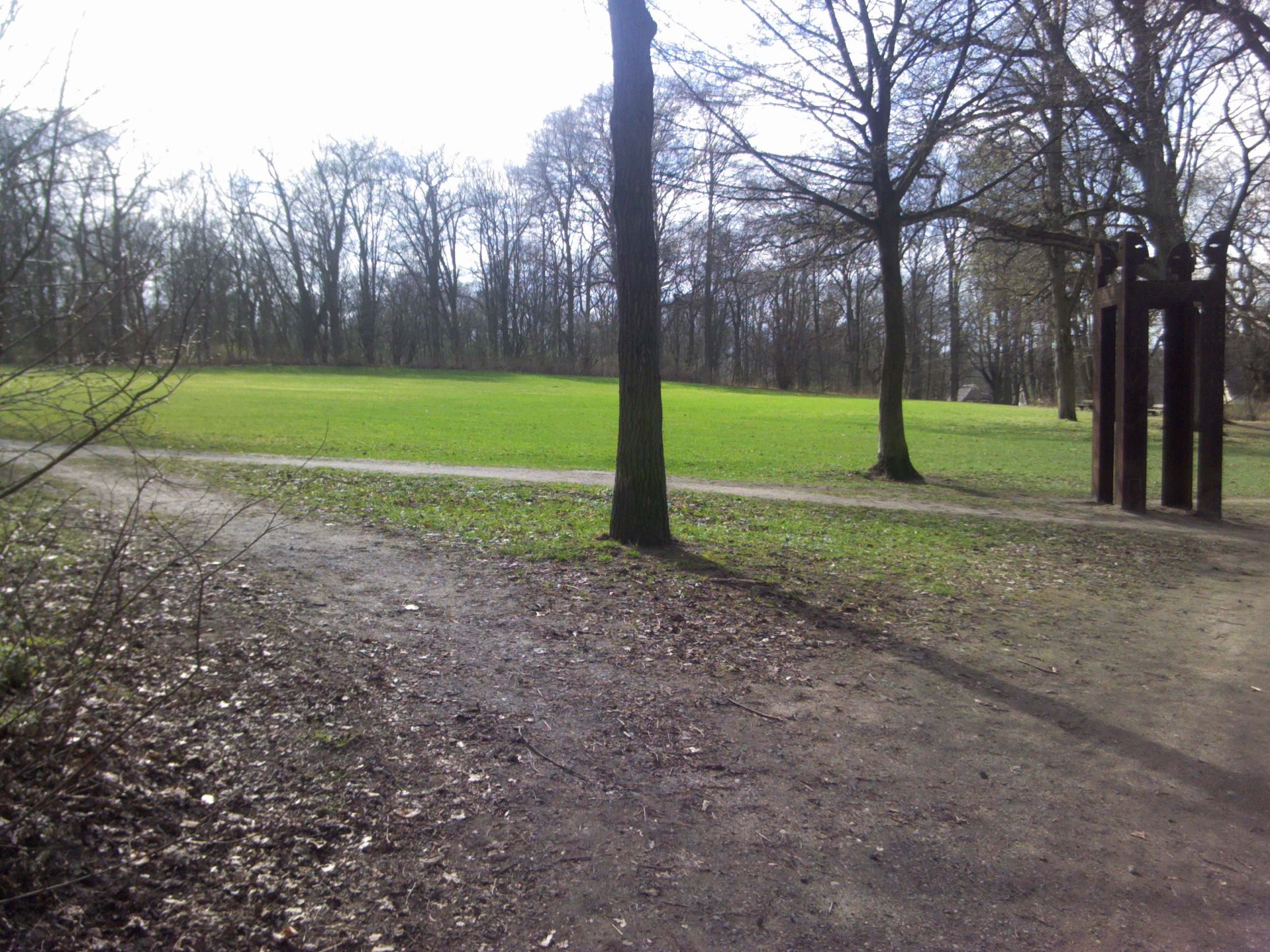 Frühjahr 2013